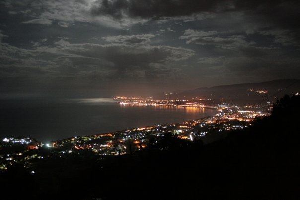 Visuale Notturna Montepaone-Soverato